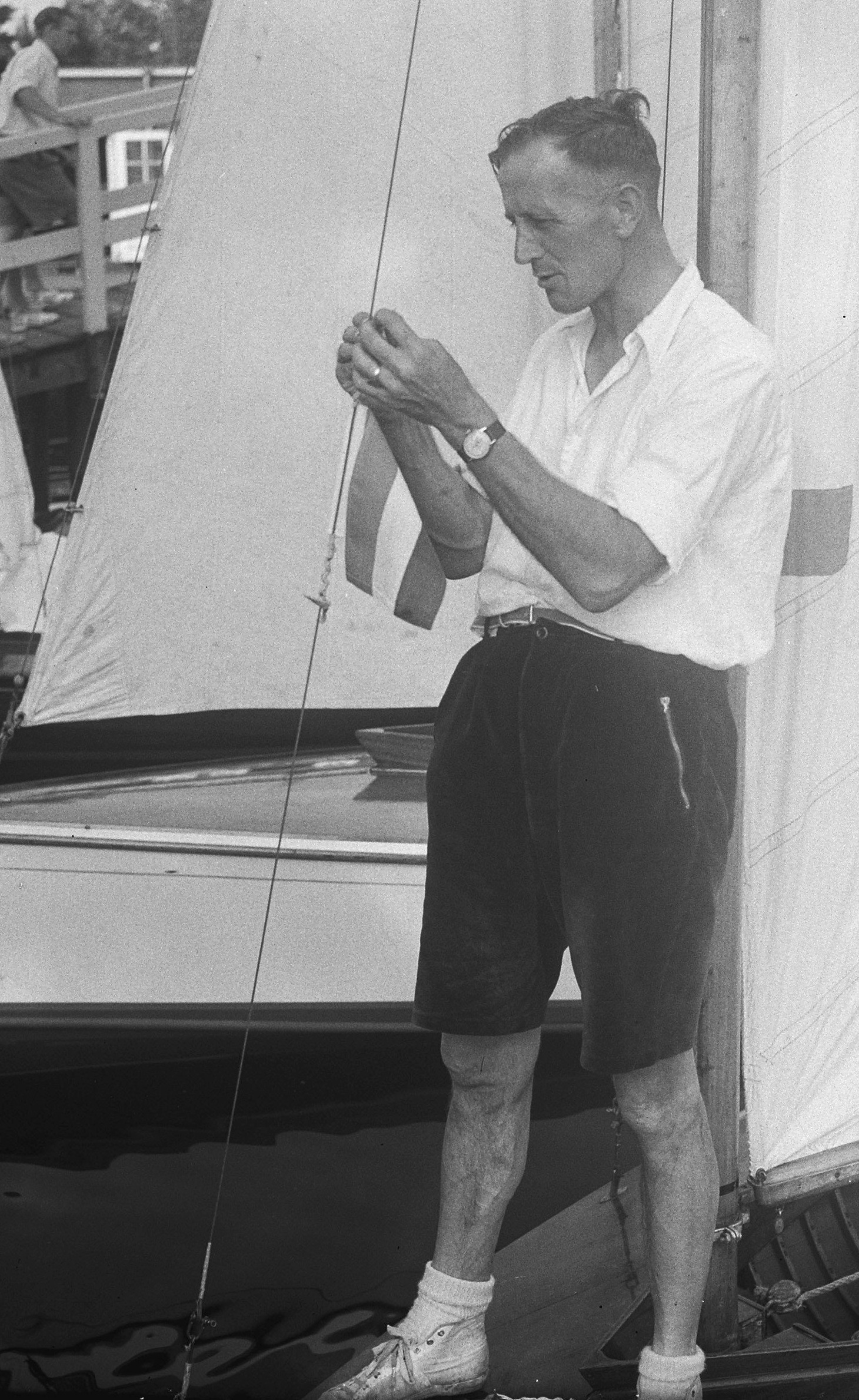 Europees Zeilkampioen Koos de Jong